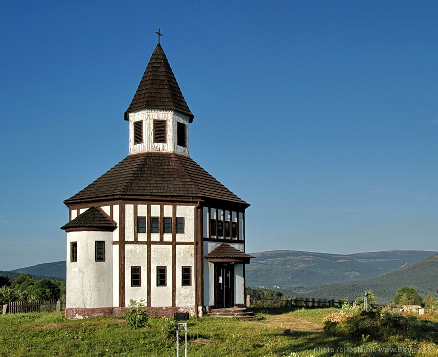 Tesařovská kaple, Kořenov